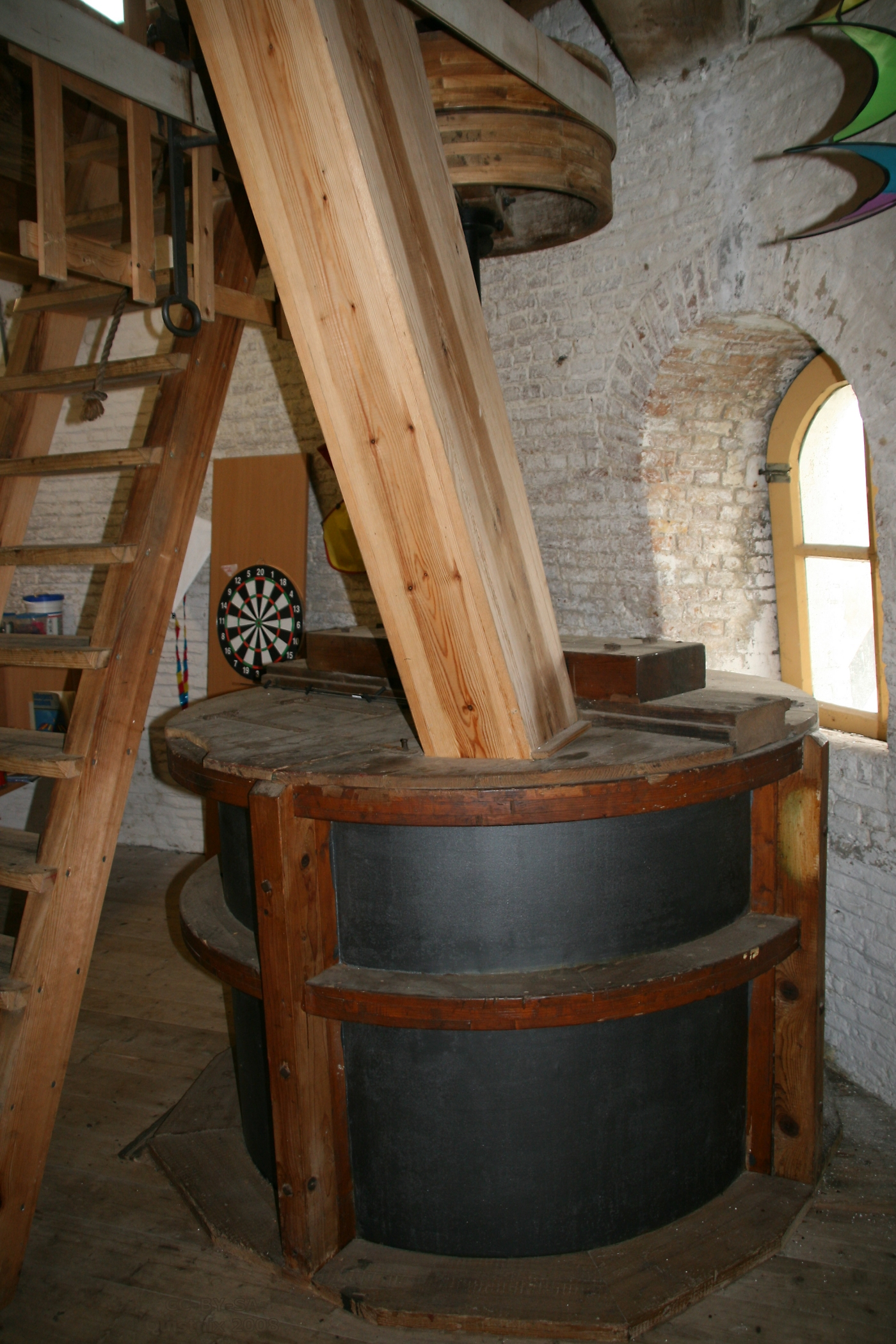 Gorinchem: korenmolen "De Hoop" - interieur: bovenkant mengketel. In de molen is een ruimte ingericht voor kinderfeestjes, vandaar het dartbord.